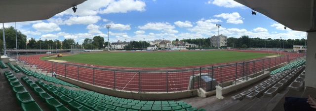 Photographie panoramique du Stade Jean-Bruck, anciennement Stade du Vieux-Pré, à Dreux, prises du centre des tribunes.